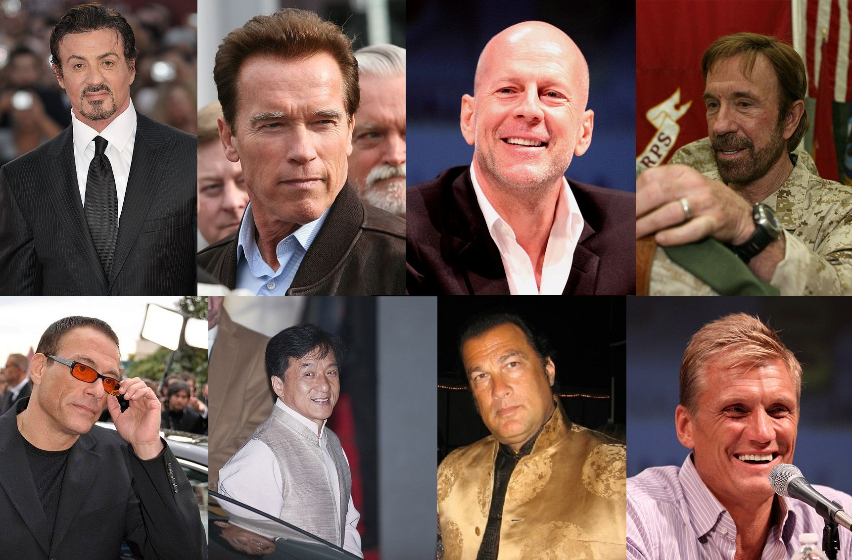 Fotomontaggio con alcuni attori d'azione della vecchia scuola: Sylvester Stallone - Arnold Schwarzenegger - Bruce Willis - Chuck Norris - Jean-Claude Van Damme - Jackie Chan - Steven Seagal - Dolph Lundgren